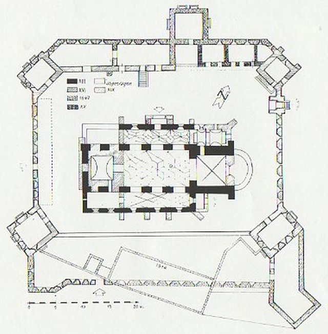 Planul fortificatiei din Dealu Frumos.